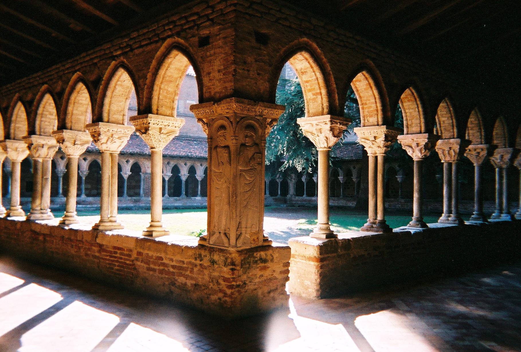 Cloître de l'abbaye Saint-Pierre de Moissac, pilier de St Philippe tenant le livre